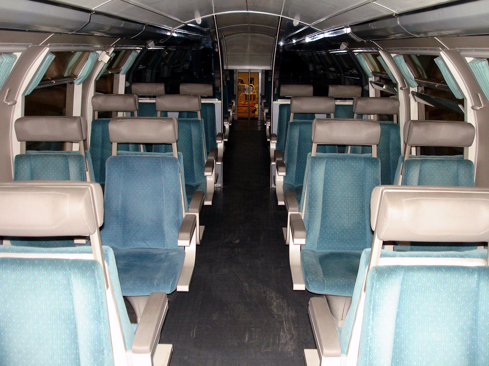 Salle haute d'une VO 2N au technicentre Paris Nord-Joncherolles, Villetaneuse, Seine-Saint-Denis, France.